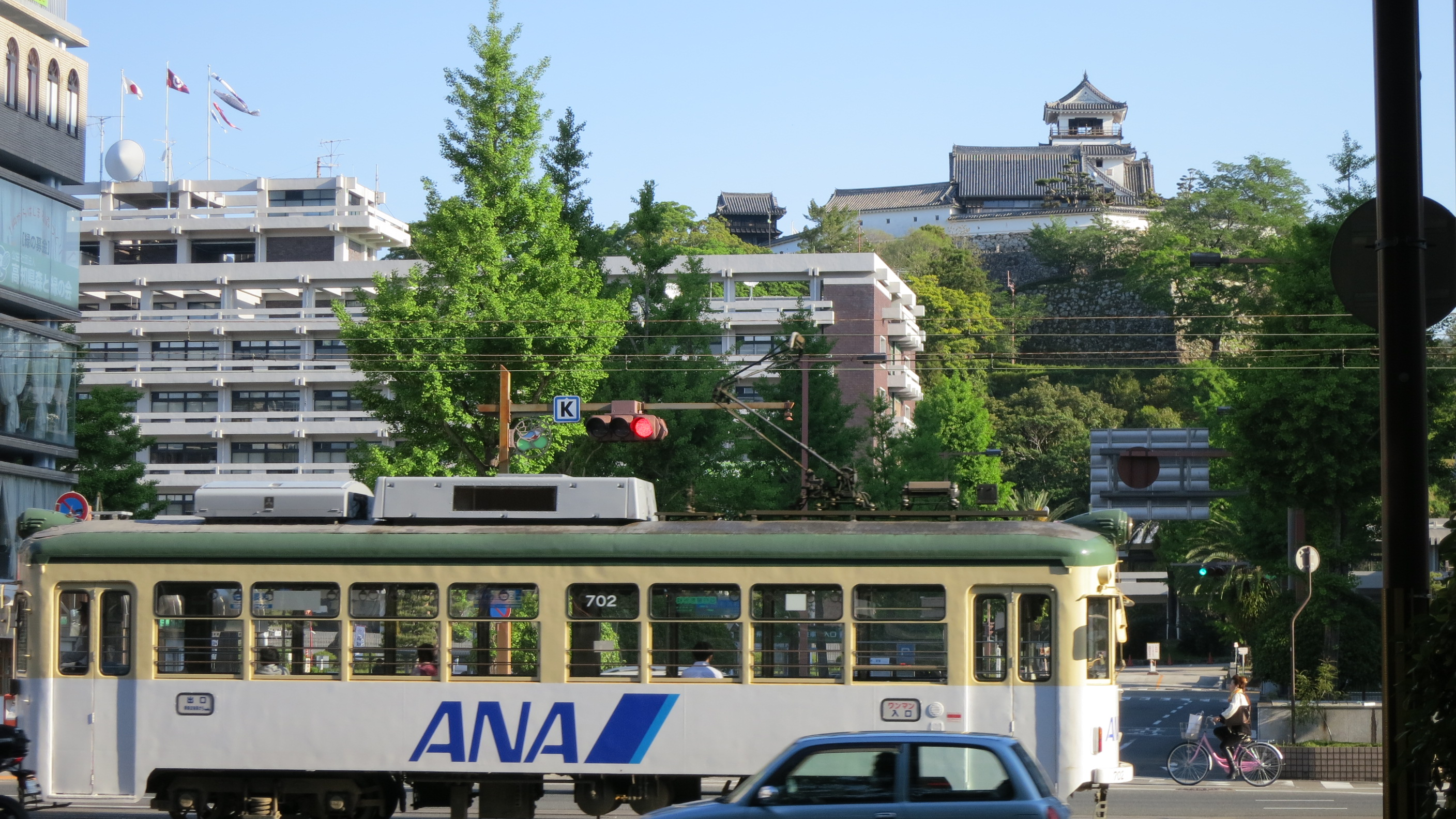 国道33号 起点高知市